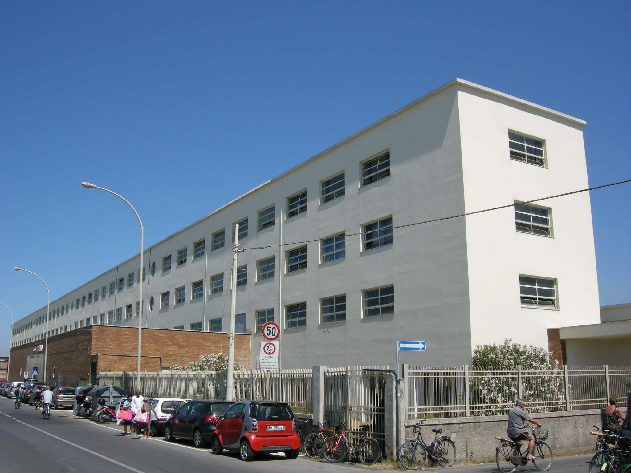 Colonia Torino